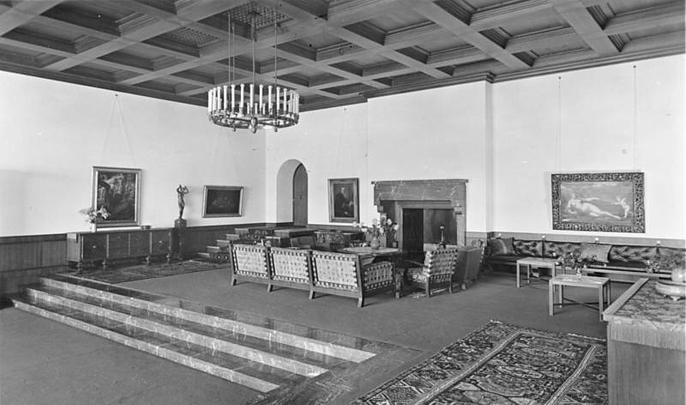 Obersalzberg Der Berghof vor der Zerstörung